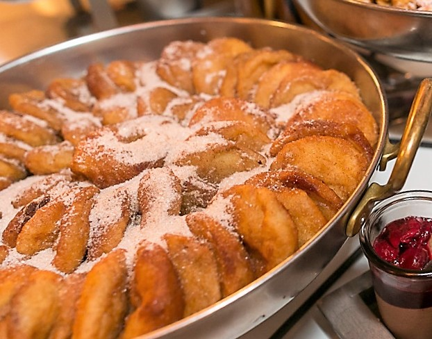 Apfelküchle (Apfelringe, Apfelbeignets), hier bei einem Buffet-Dinner im Hotel Golf Resort Achental in Grassau, am Chiemsee, in Bayern/­Deutschland.